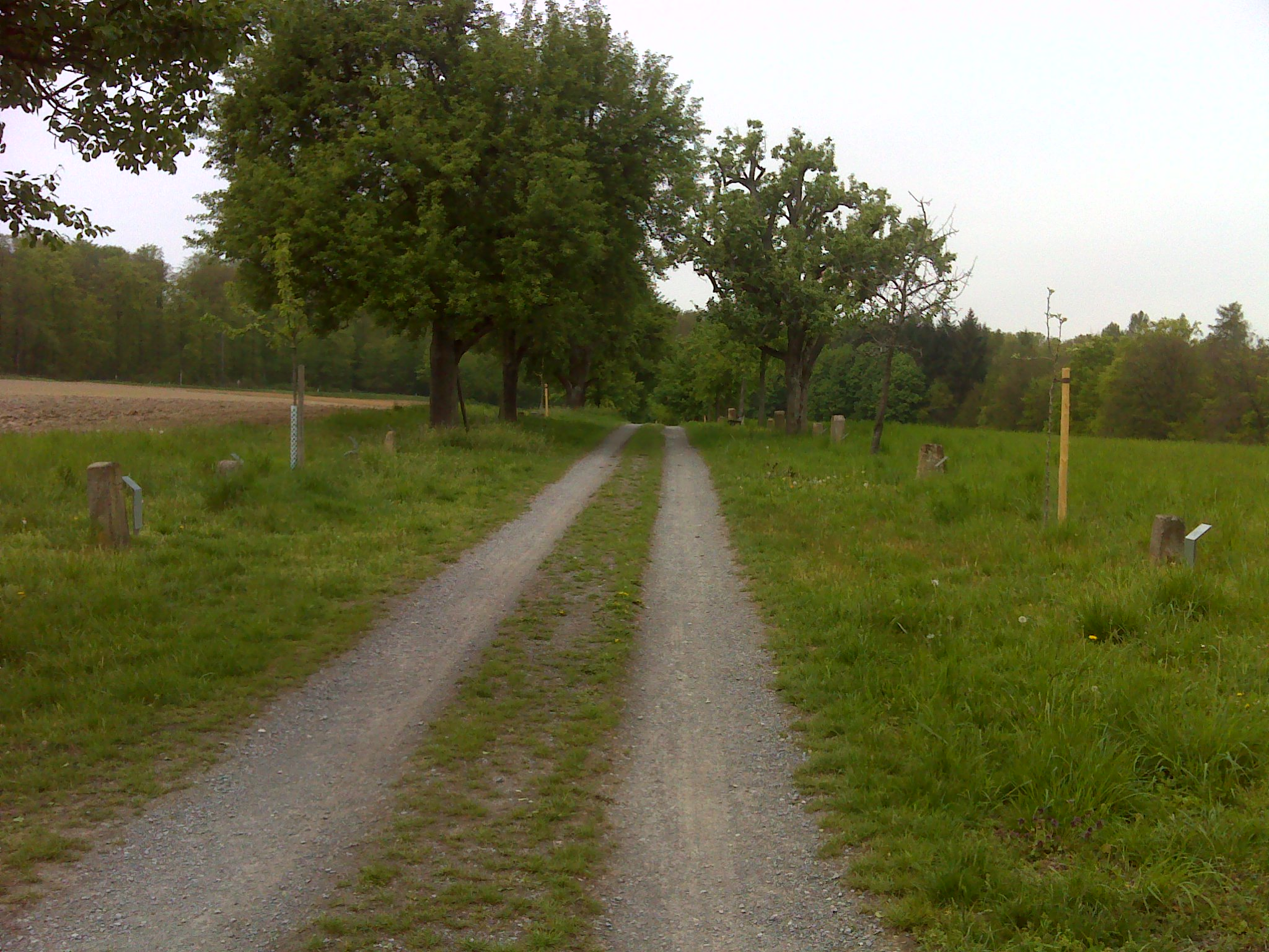 Grenzsteingarten Kleingartach an der Birnbaumallee